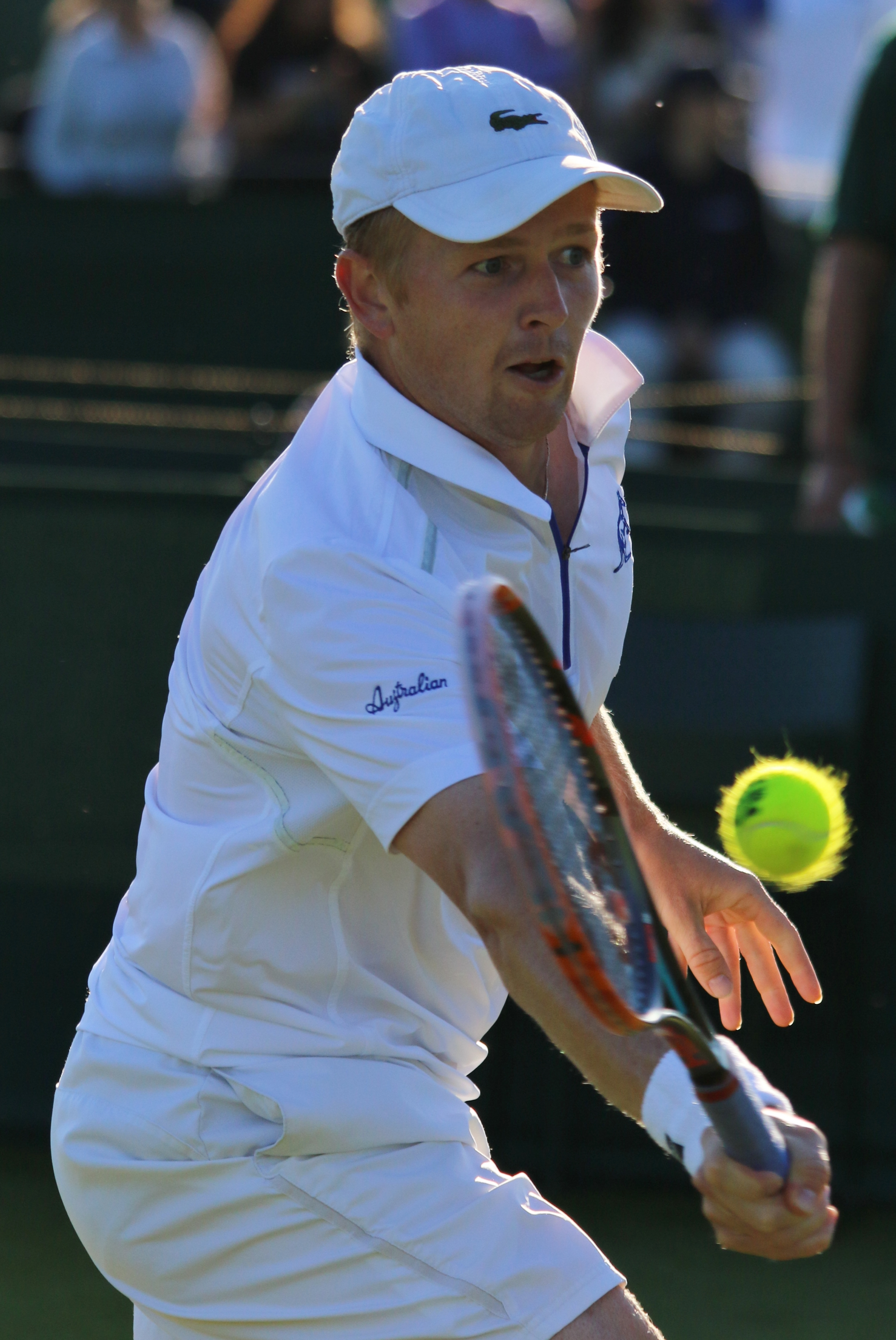 Golubev WMQ16 (9)